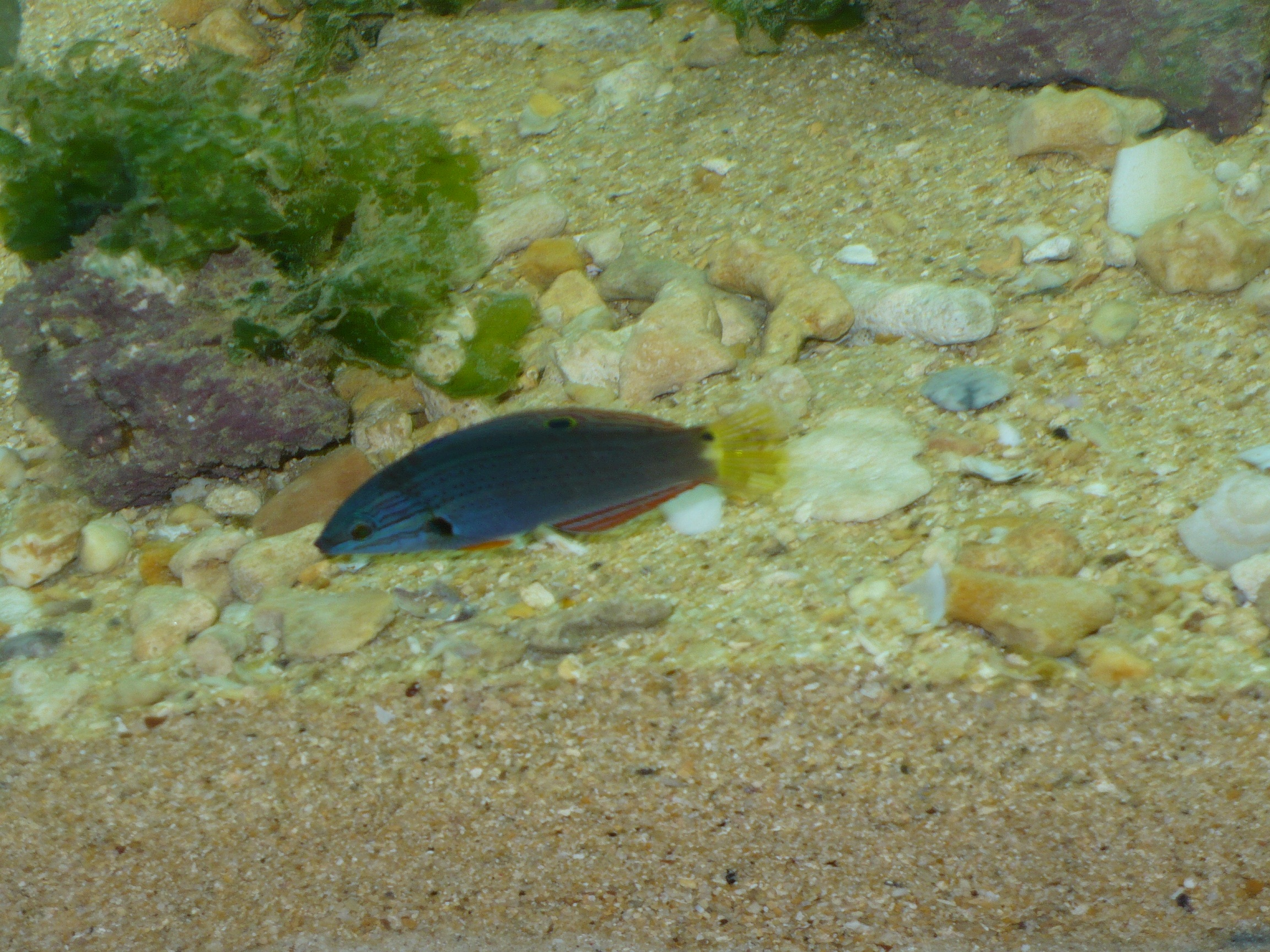 Halichoeres melanochir alle isole Ryukyu